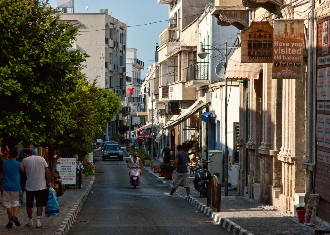 Kyrenia IMG_5401